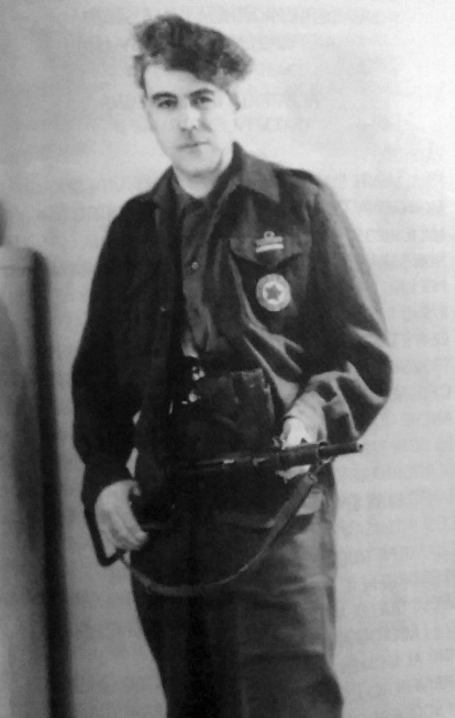 Renato Jacopini